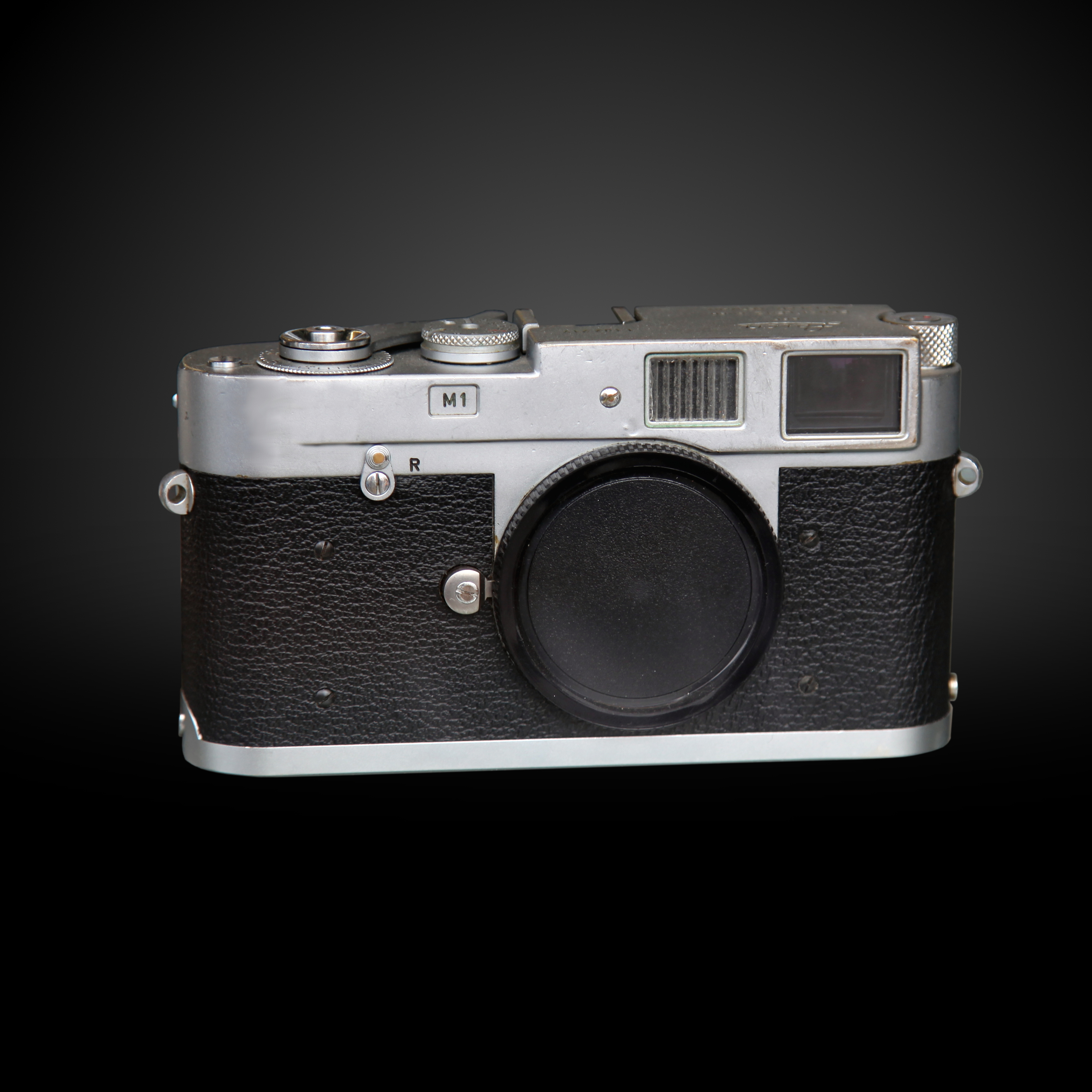 Leica M1 body